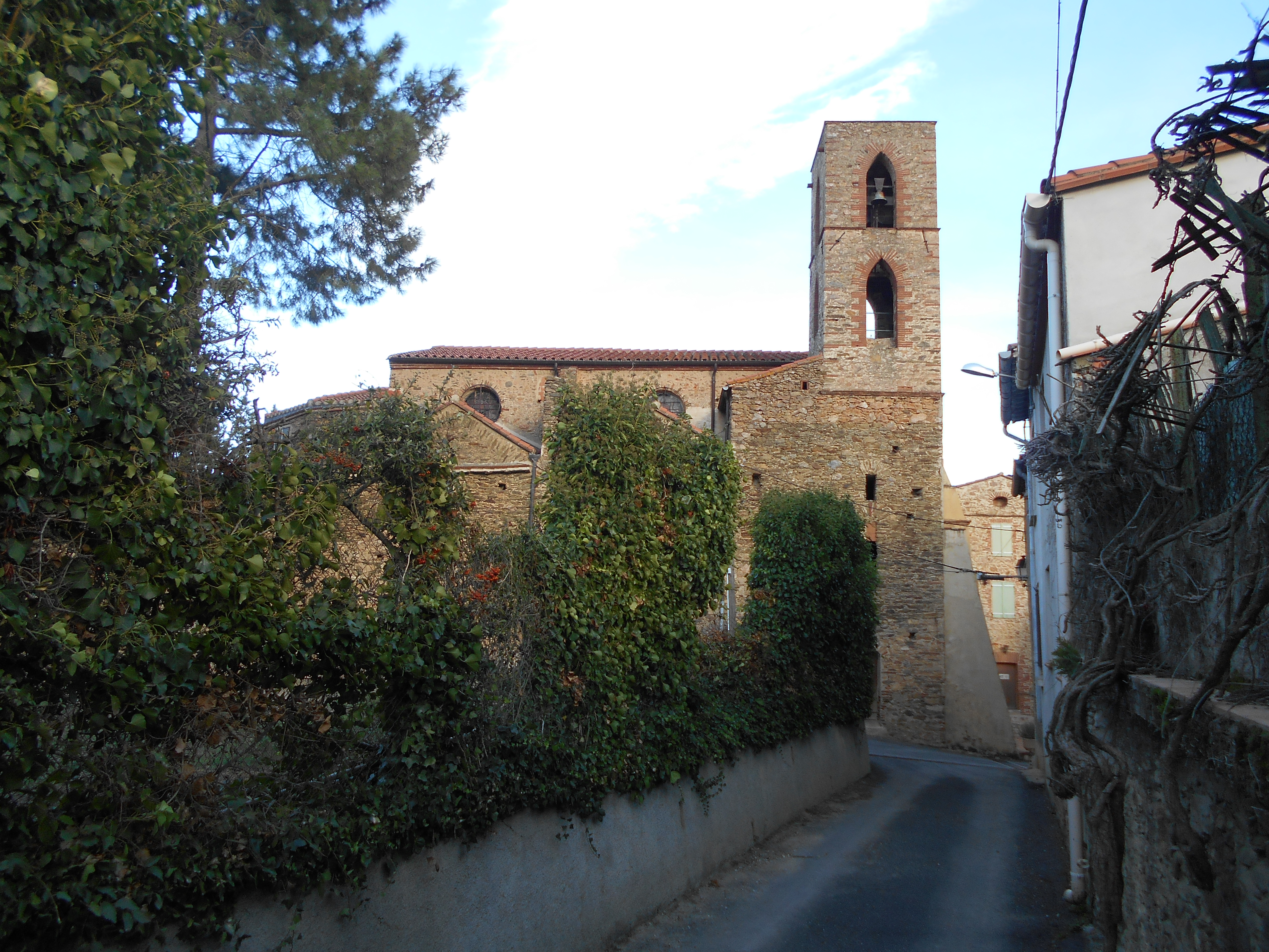 Sant Pere de Corbera